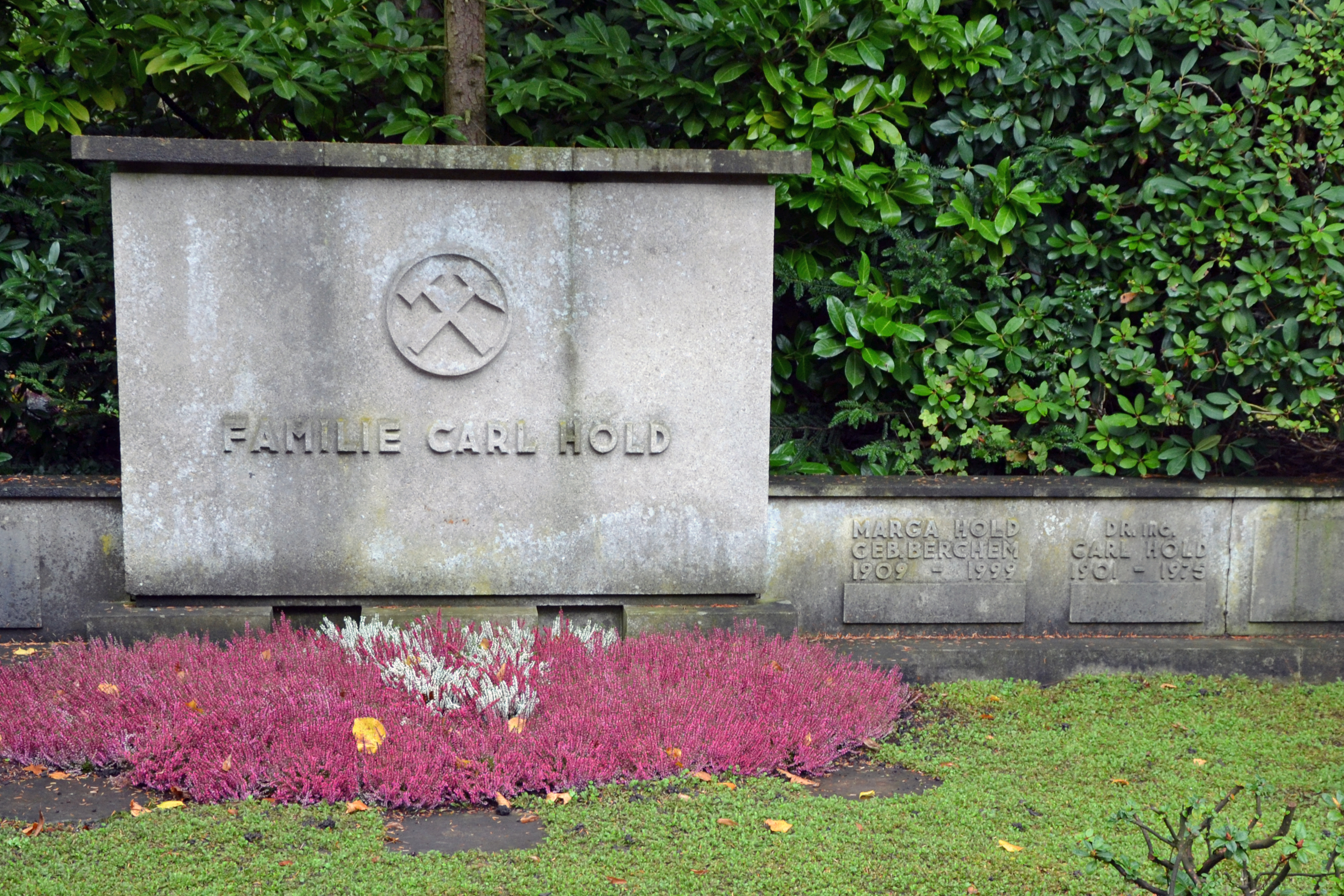 Friedhof Essen-Bredeney, Grabmal des deutschen Politikers und Industriellen Carl Hold (1871-1946)